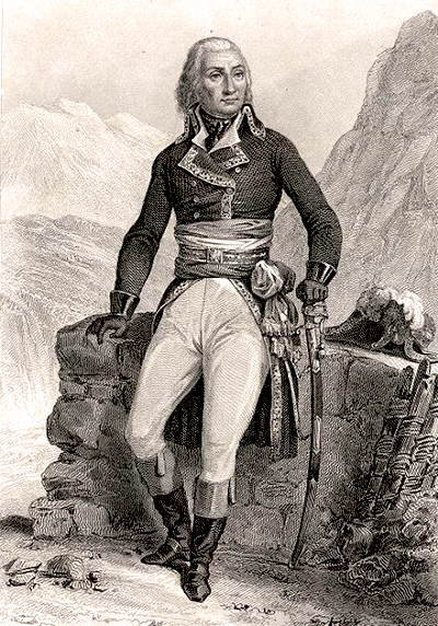 Jean-Baptiste Jourdan (1762-1833), général de la Révolution et futur maréchal d'Empire.